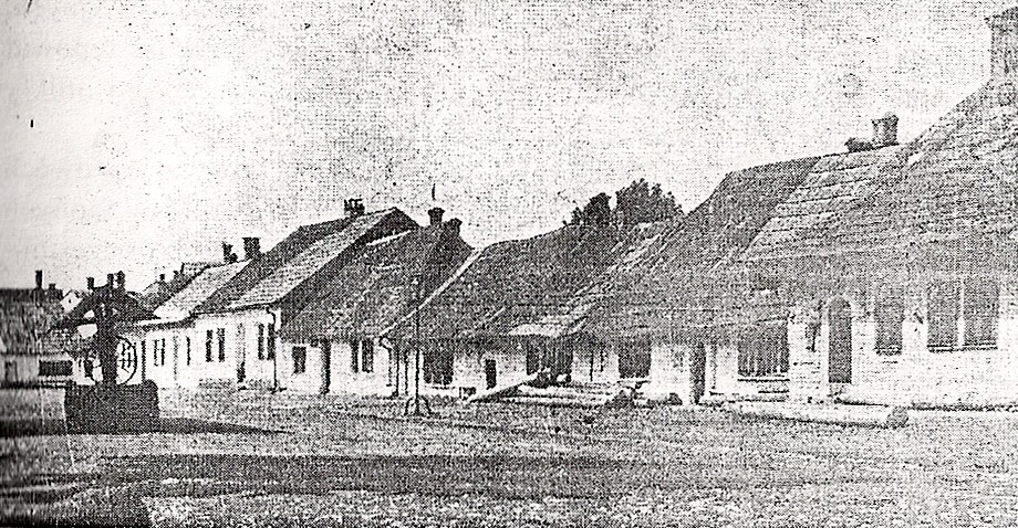 Rudza w Żywcu